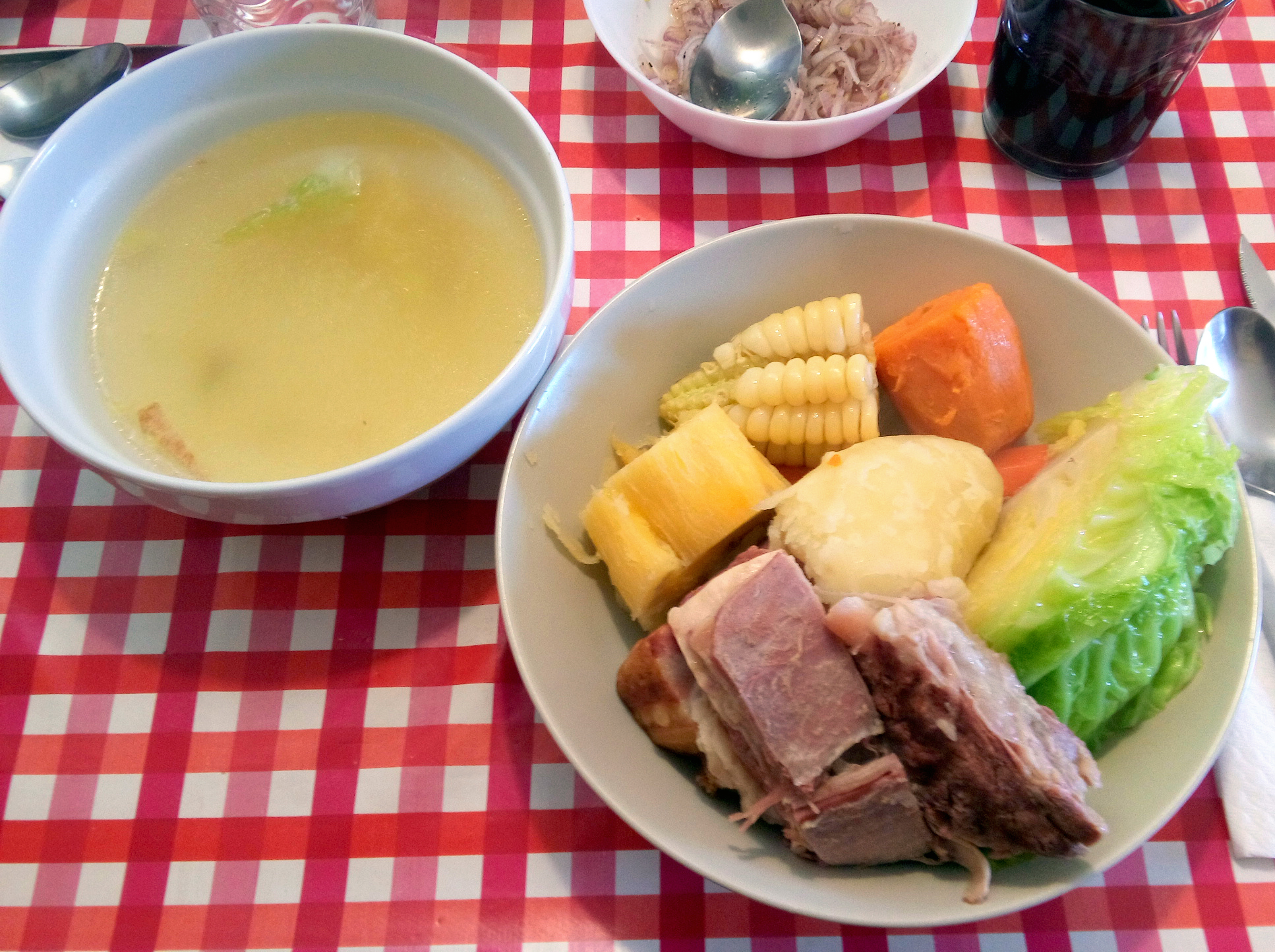 Un rico sancochado limeño. La sopa y el condumio (carne y verdura).